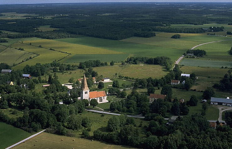 Motiv: Sanda kyrka Nyckelord: Flygbilder, Riksintressen Kategori: KyrkomiljöSanda kyrka